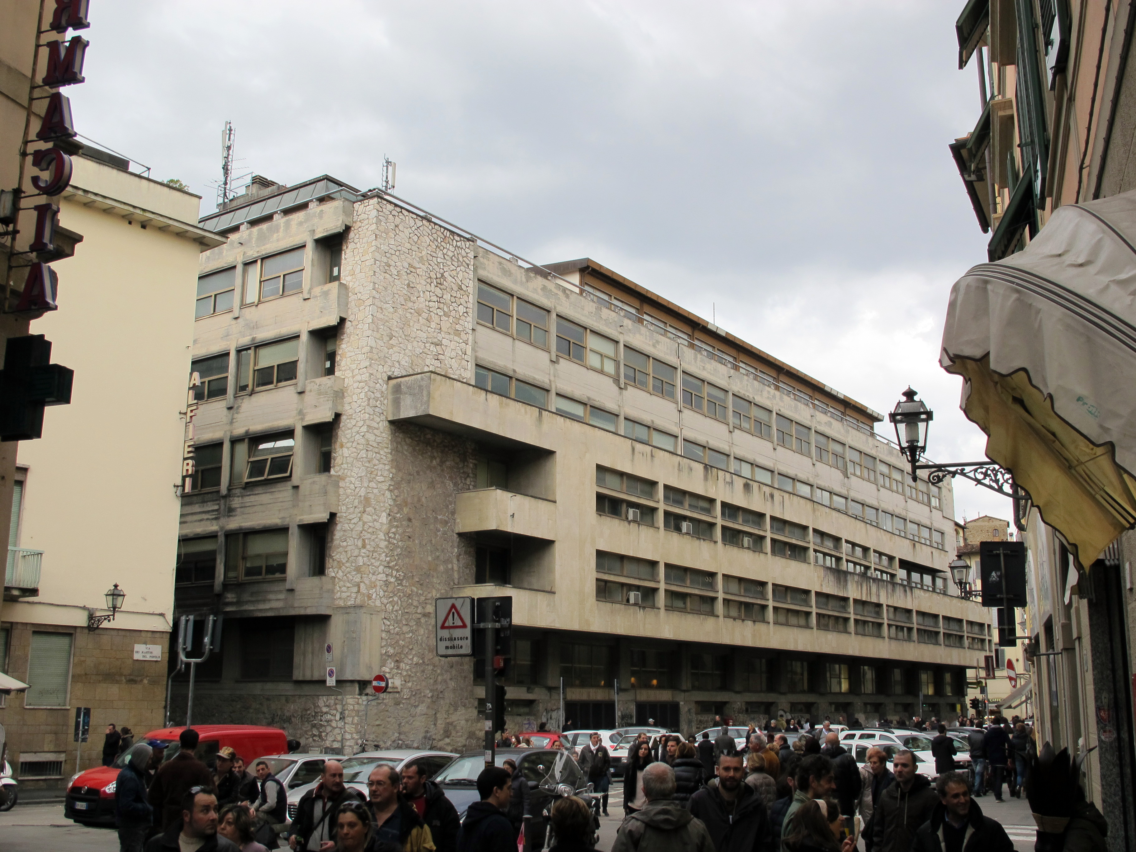 Via pietrapiana veduta